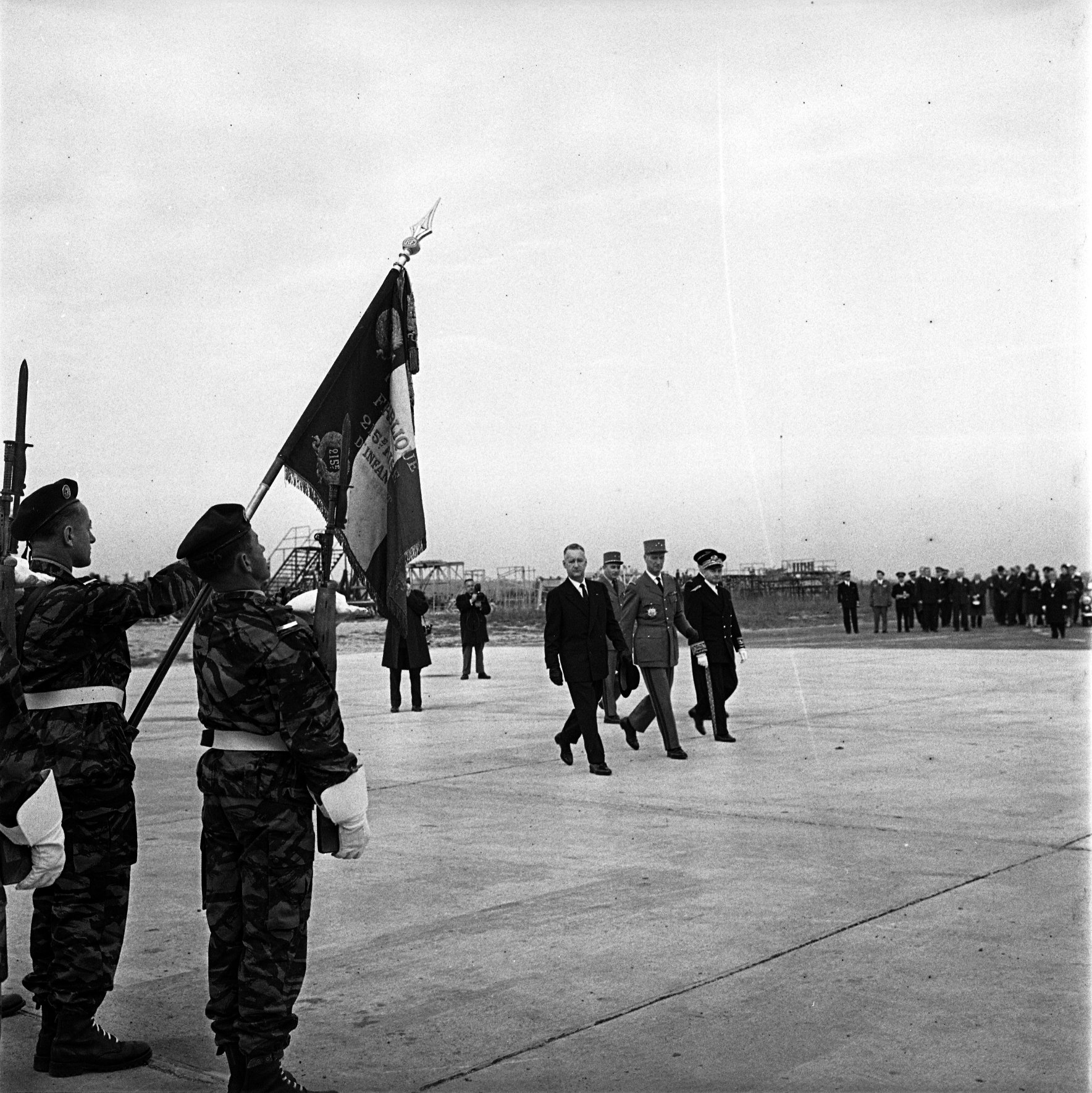 Ateliers Bréguet (Colomiers). 3 novembre 1961. Vue d'ensemble de l'arrivée de Pierre Messmer (ministre de la Guerre) accompagné par d'autres personnalités militaires ; au 1er plan à gauche militaires au garde à vous (vue de 3/4 dos). Cliché pris lors du baptême de l'avion militaire "Bréguet 1150 Atlantic" destiné aux forces de l'OTAN.